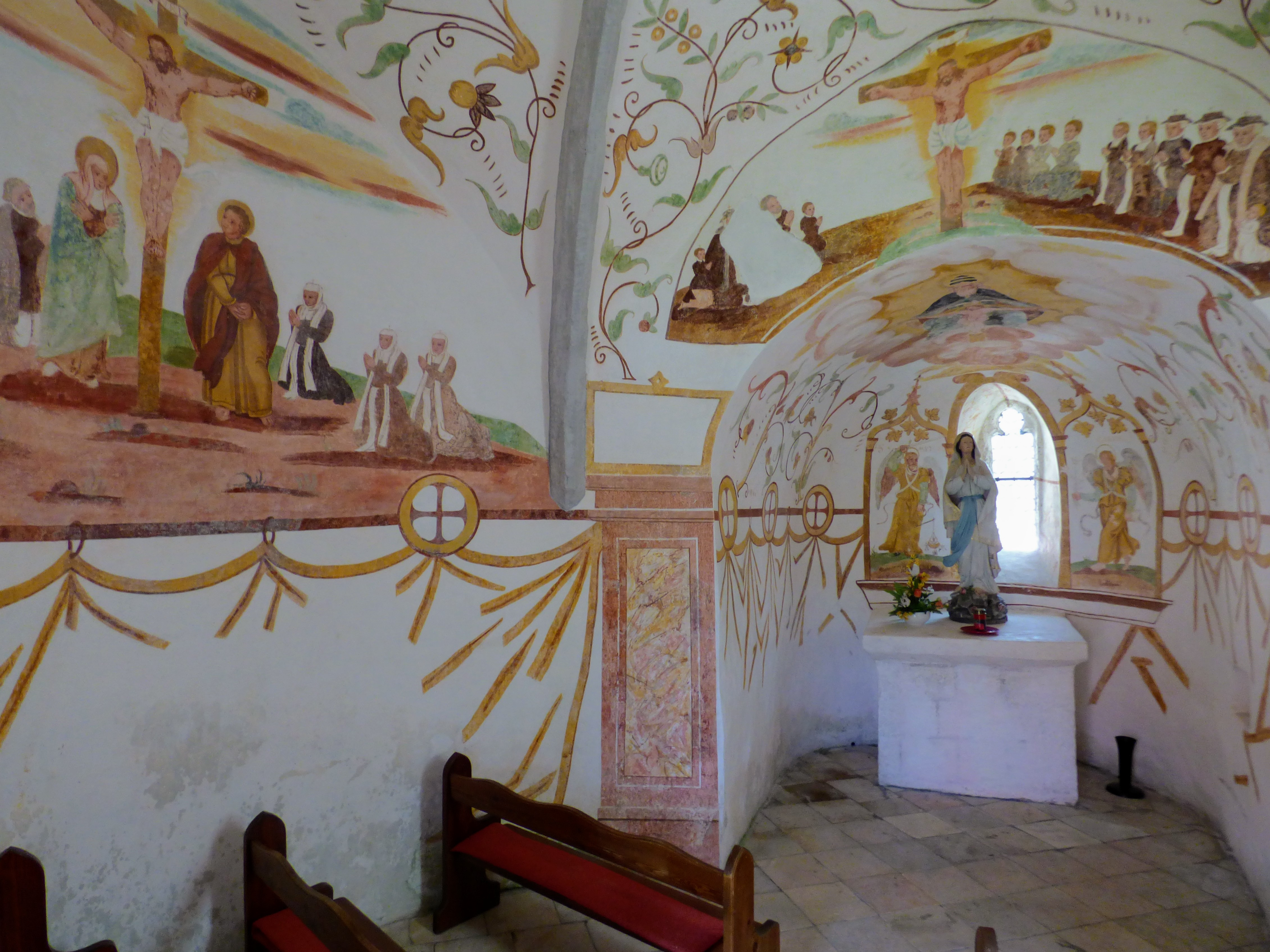 Karner Globasnitz: frühbarocke Rankenmalereien